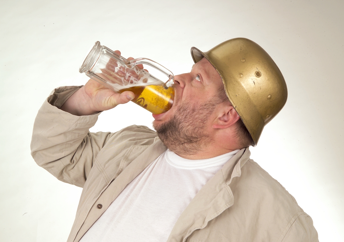 Die Bierhähne